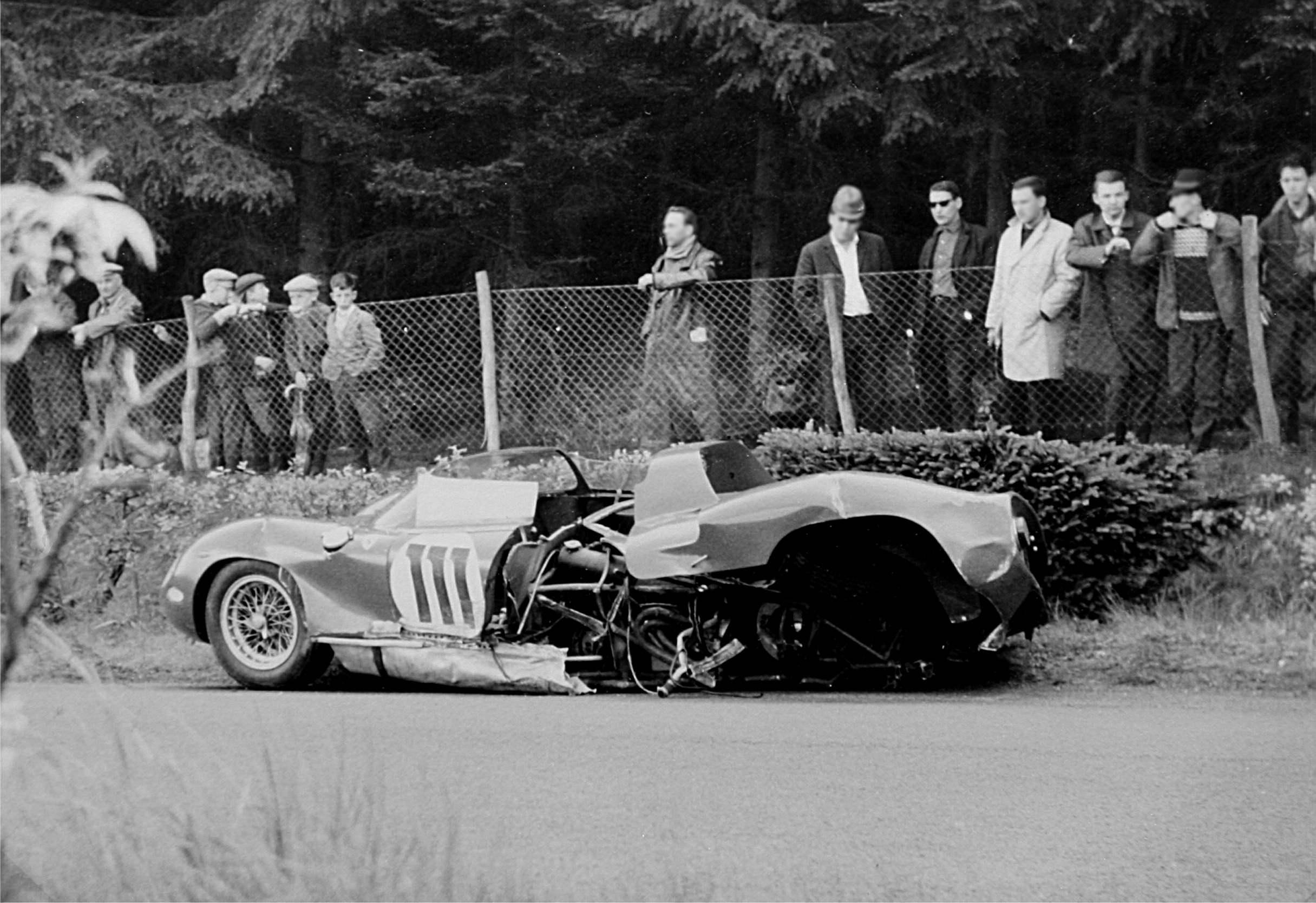 Ferrari 250 P von Mike Parkes beim 1000-km-Rennen auf dem Nürburgring. ausgangs Arembergkurve/Anfang Fuchsröhre nach einer Kollision mit Willy Mairesse, Fahrer unverletzt